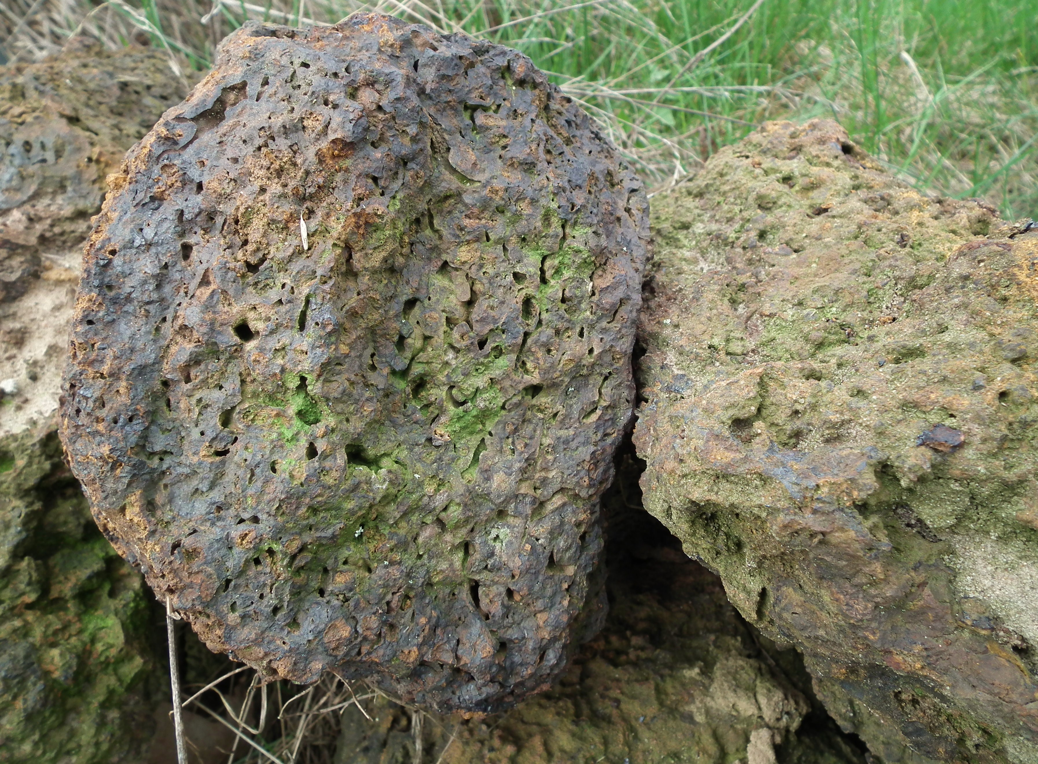 Odkrzywka rudy darniowej w Wierzchach w Puszczy Pyzdrskiej.